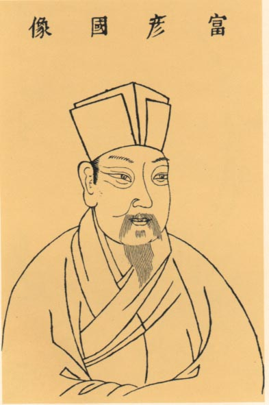 富弼像取自明代王圻辑，万历刻《三才图会》。